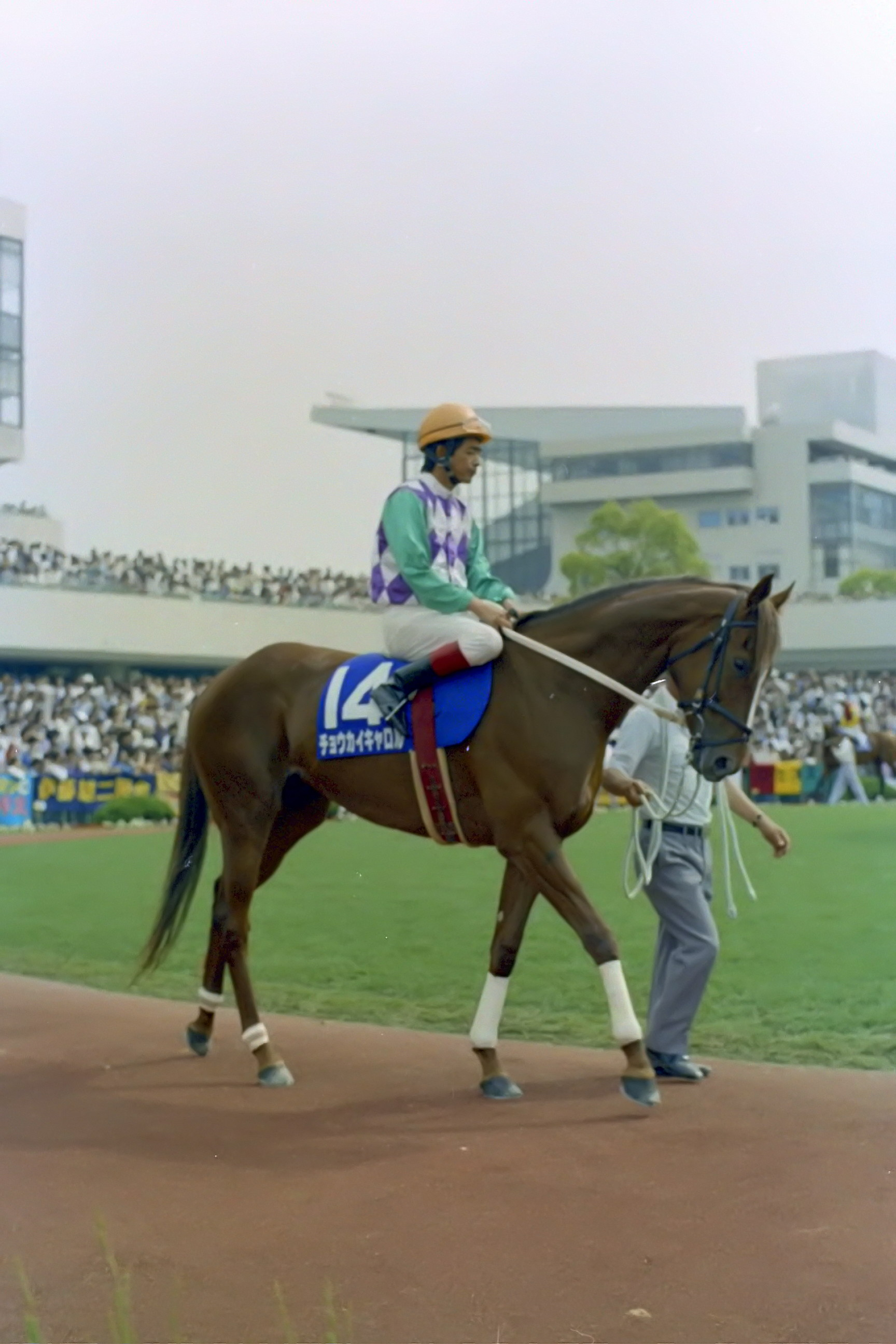 チョウカイキャロル 1995年6月4日 京都競馬場